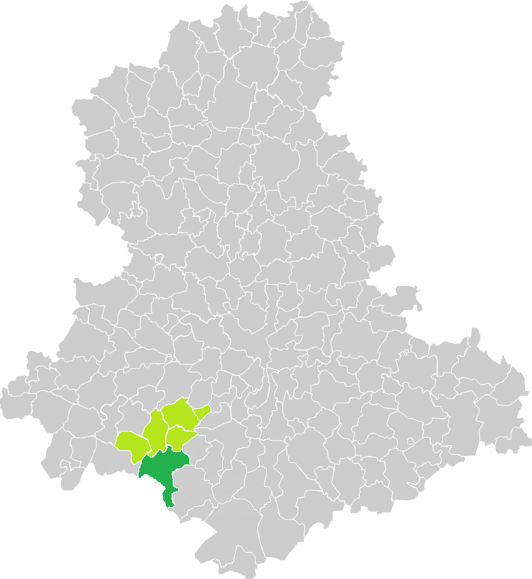 Carte de situation de la commune de Bussière-Galant (en vert foncé) dans le canton de Châlus (en vert clair) sur une carte des communes de la Haute-Vienne